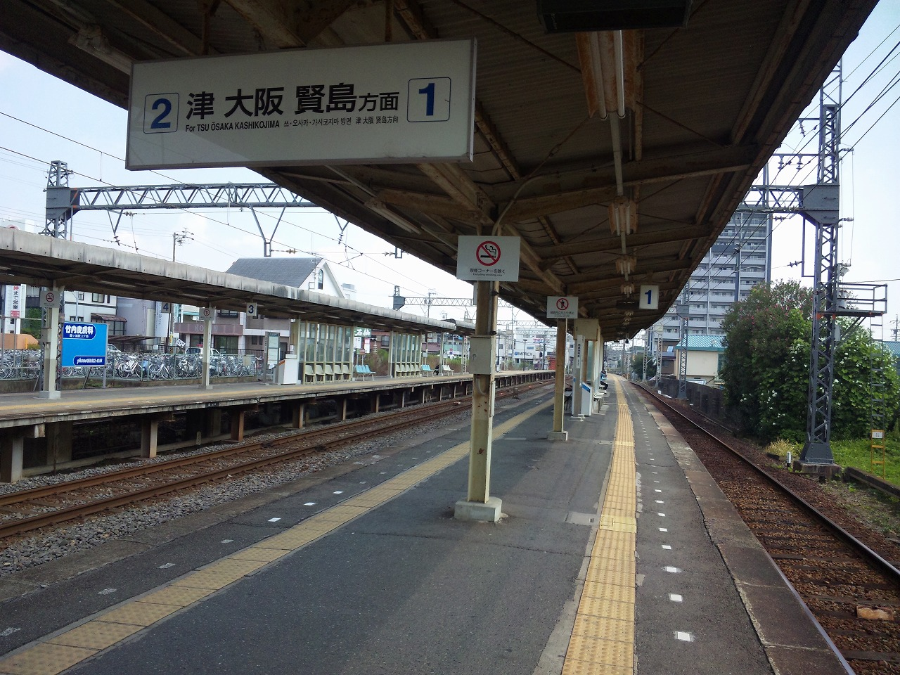 阿倉川駅1,2番線ホーム